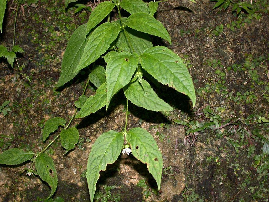 Codonopsis lancifolius：タンゲブ 2004/08/11 沖縄県那覇市：Naha City, Okinawa Pref. Japan